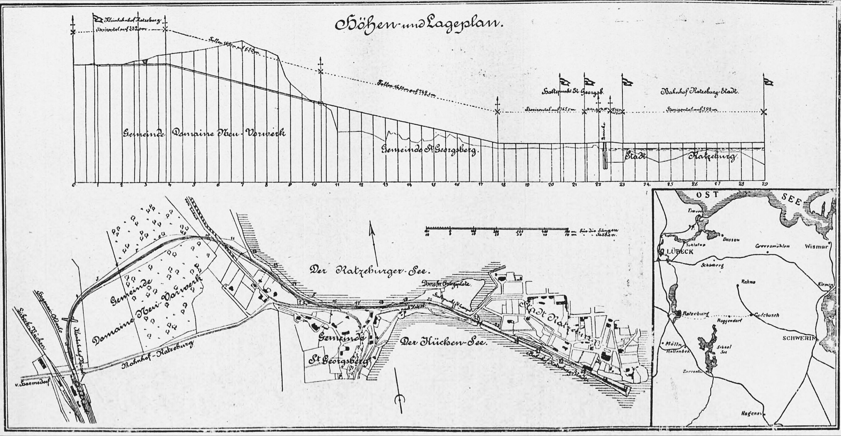 Die Kleinbahn vom Ratzeburger Bahnhof nach der Stadt Ratzeburg. Photographiert nach einem Originalbauplan von Gebrüder Borchers in Lübeck im Juni 1902.